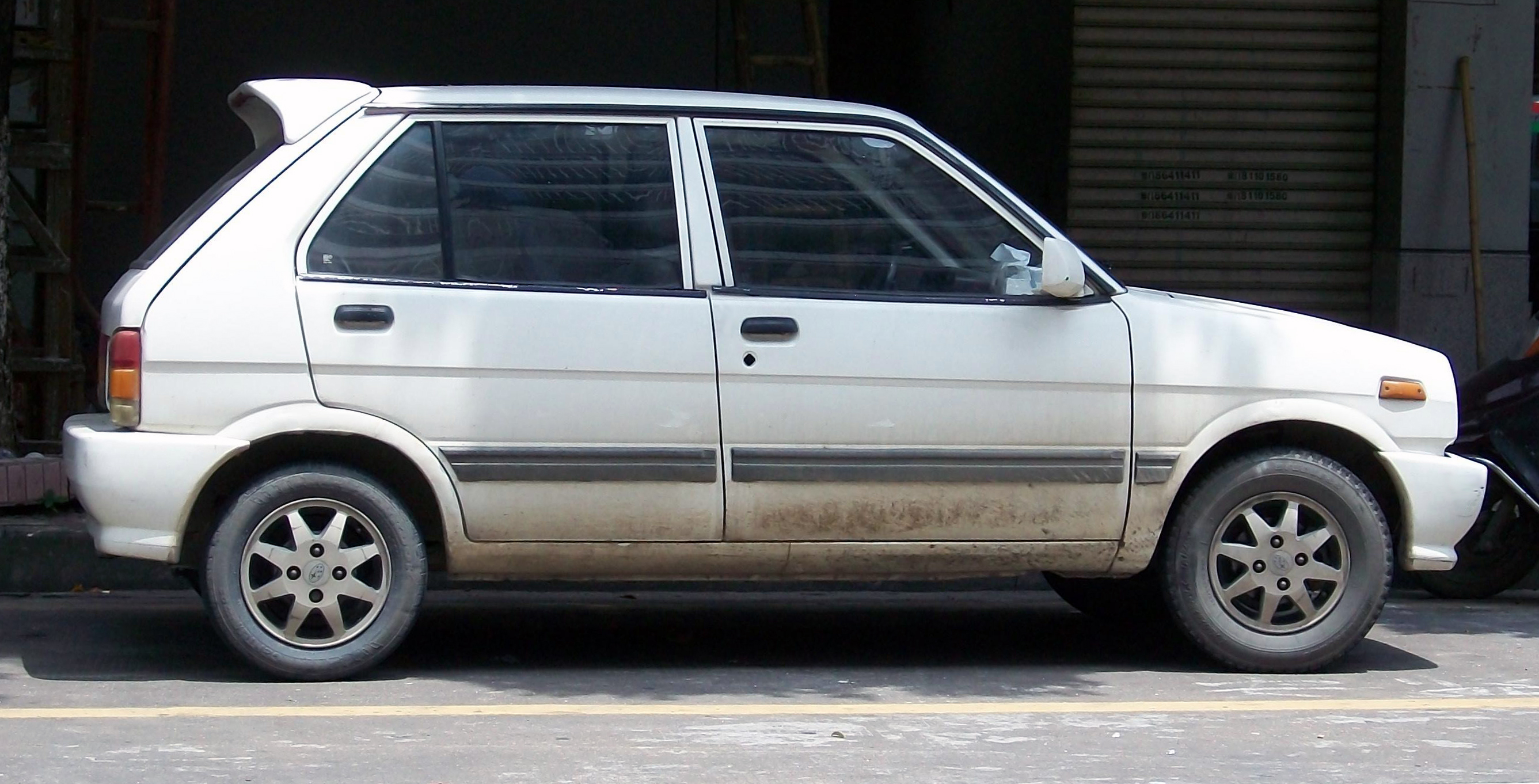 Subaru Guihang Skylark